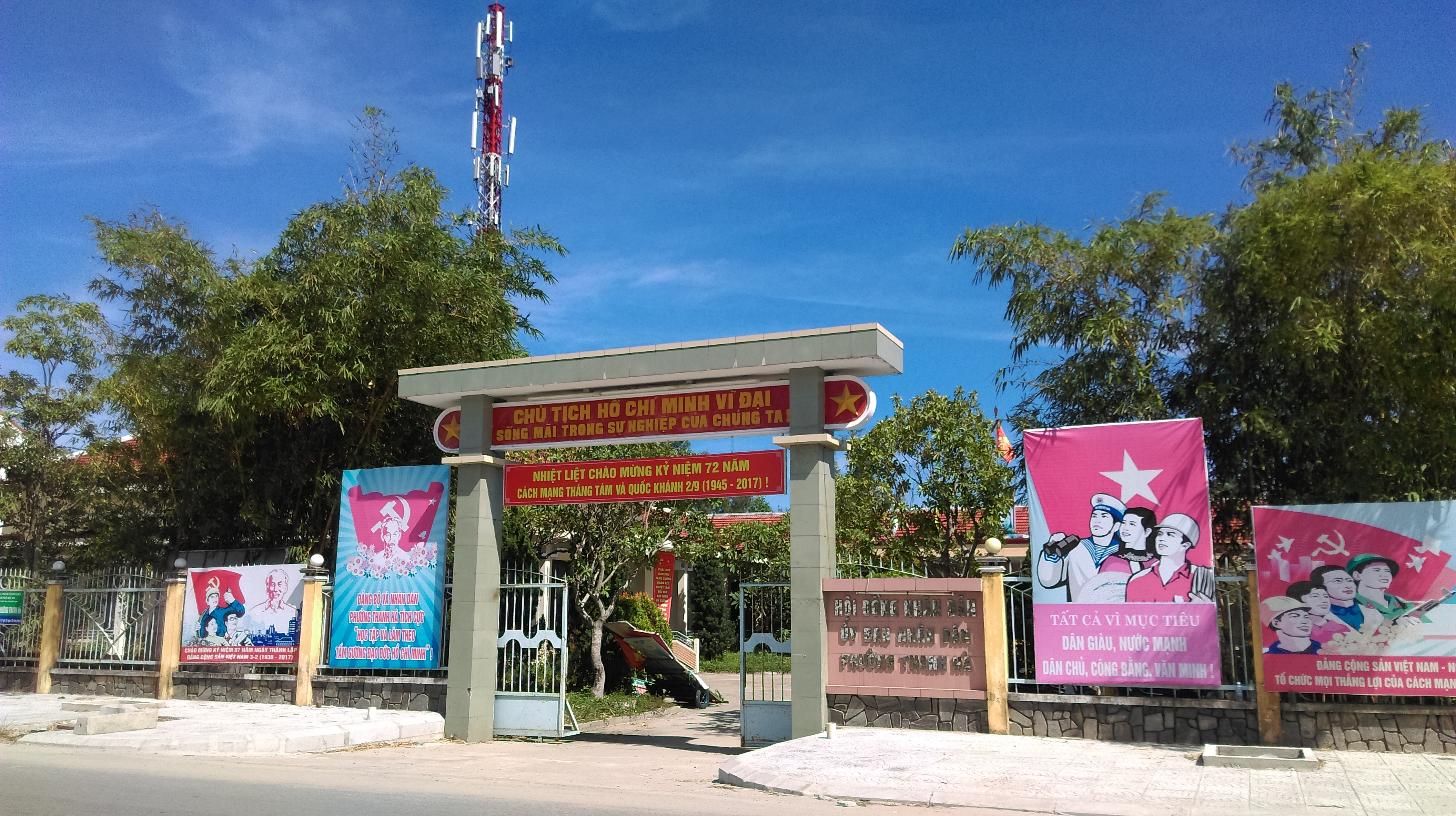 UBND phường Thanh Hà, Hội An, Quảng Nam